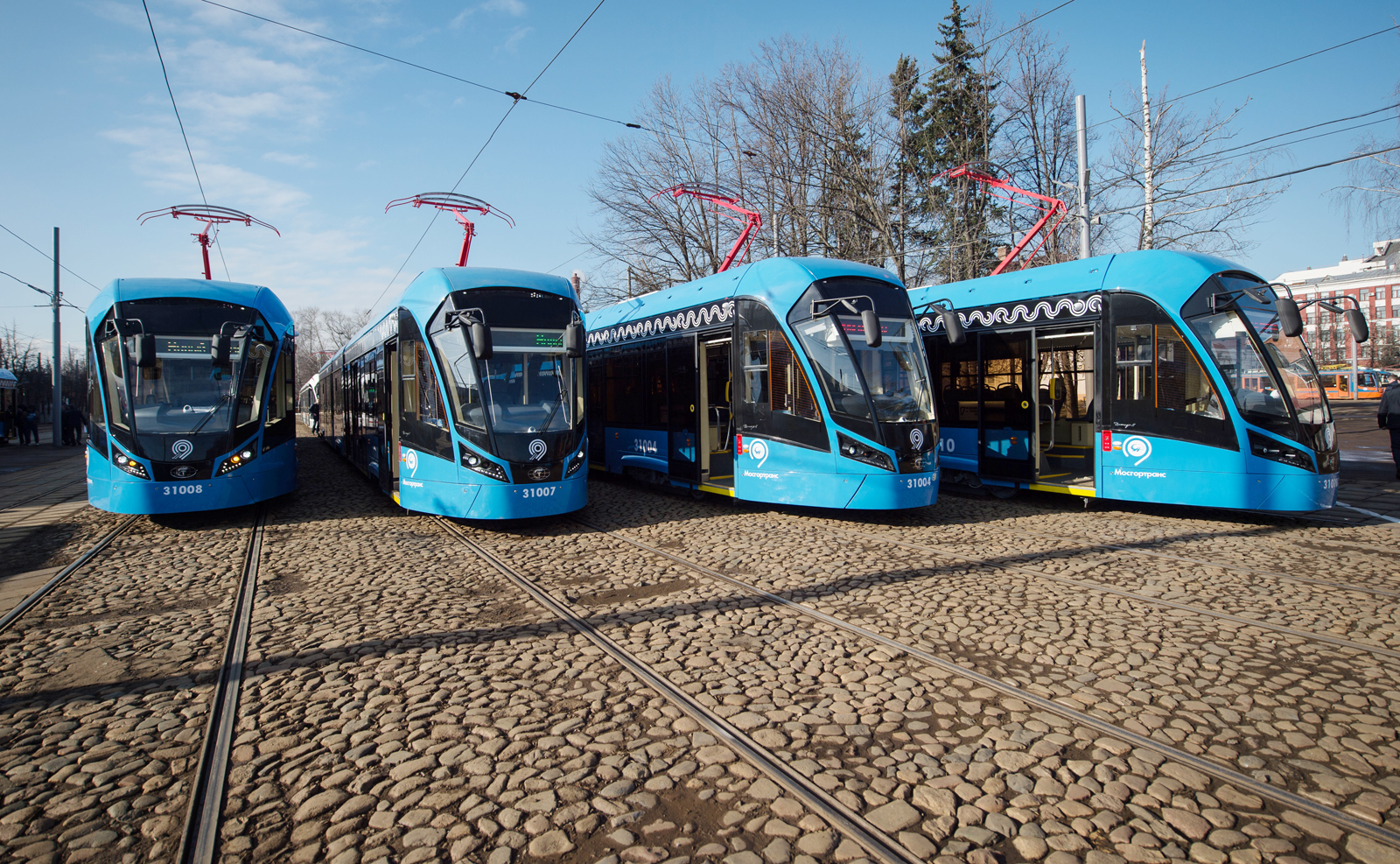 Трамваи 71-931М («Витязь-М») в Москве, выстроенные в ряд